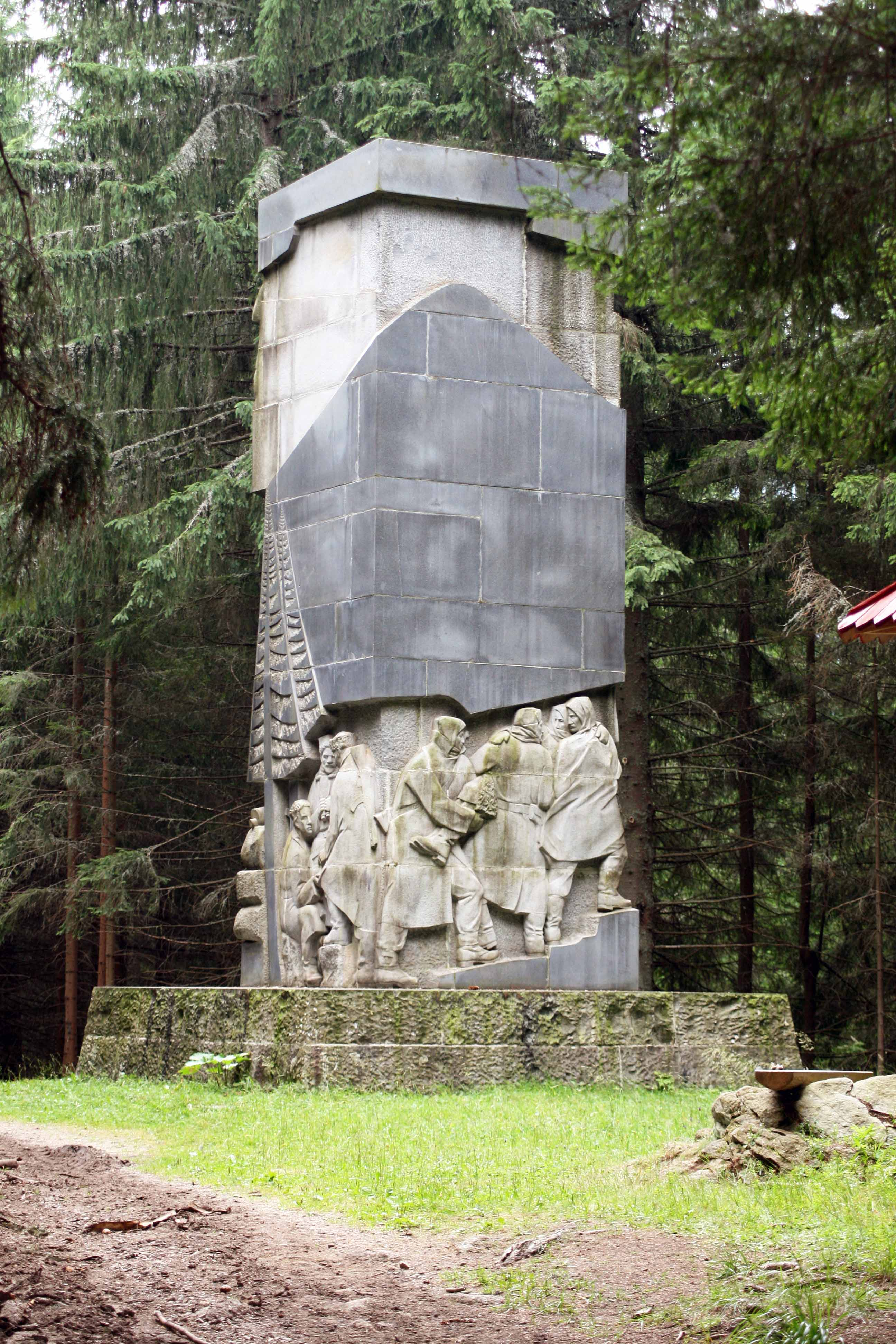 Pamätník SNP v Jasnej, )(lokalite Ostredok) je venovaný účastníkovi Slovenského národného povstania Janovi Švermovi